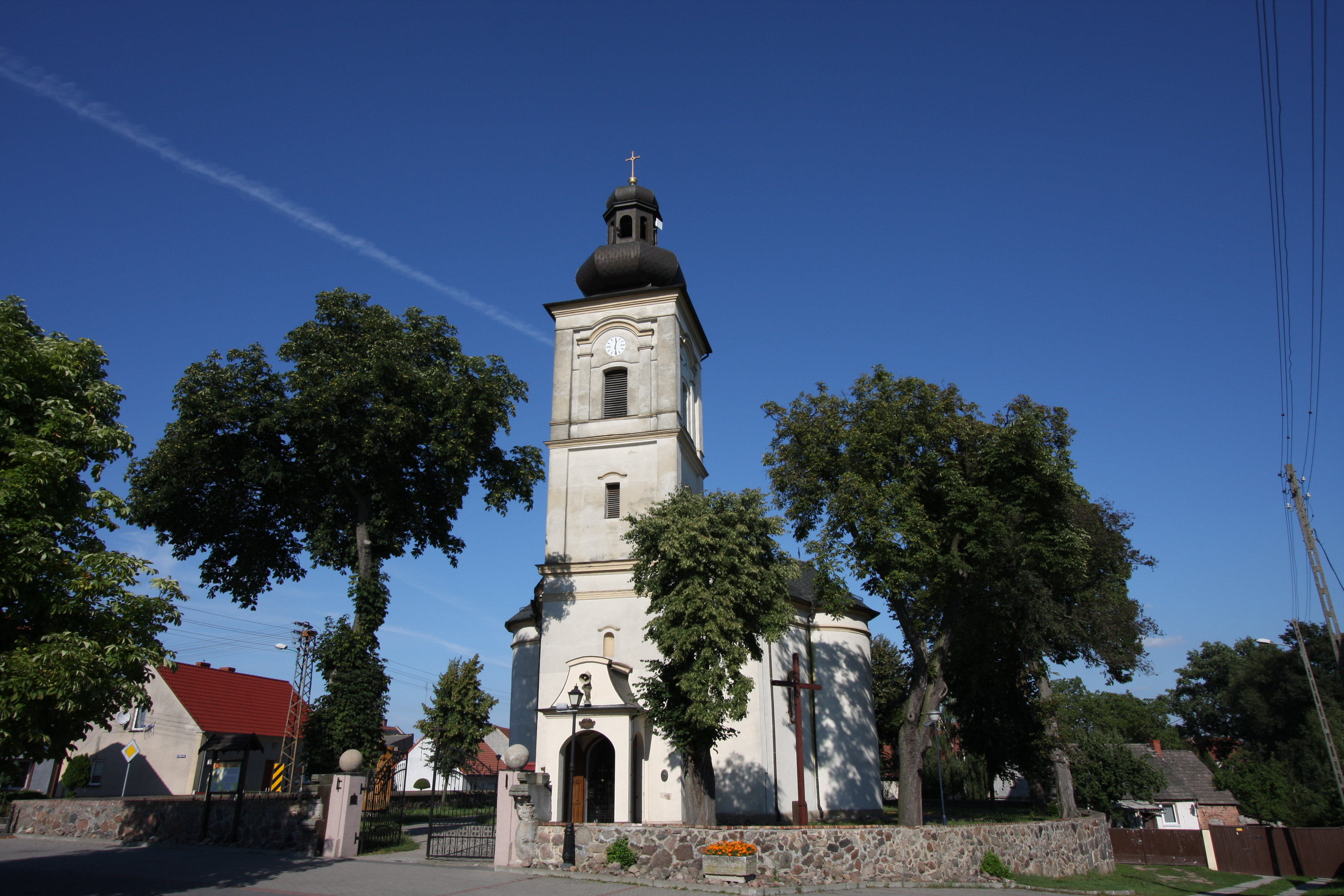 Nowe Kramsko, kościół par. p.w. Narodzenia NMP, mur., 1756-1769